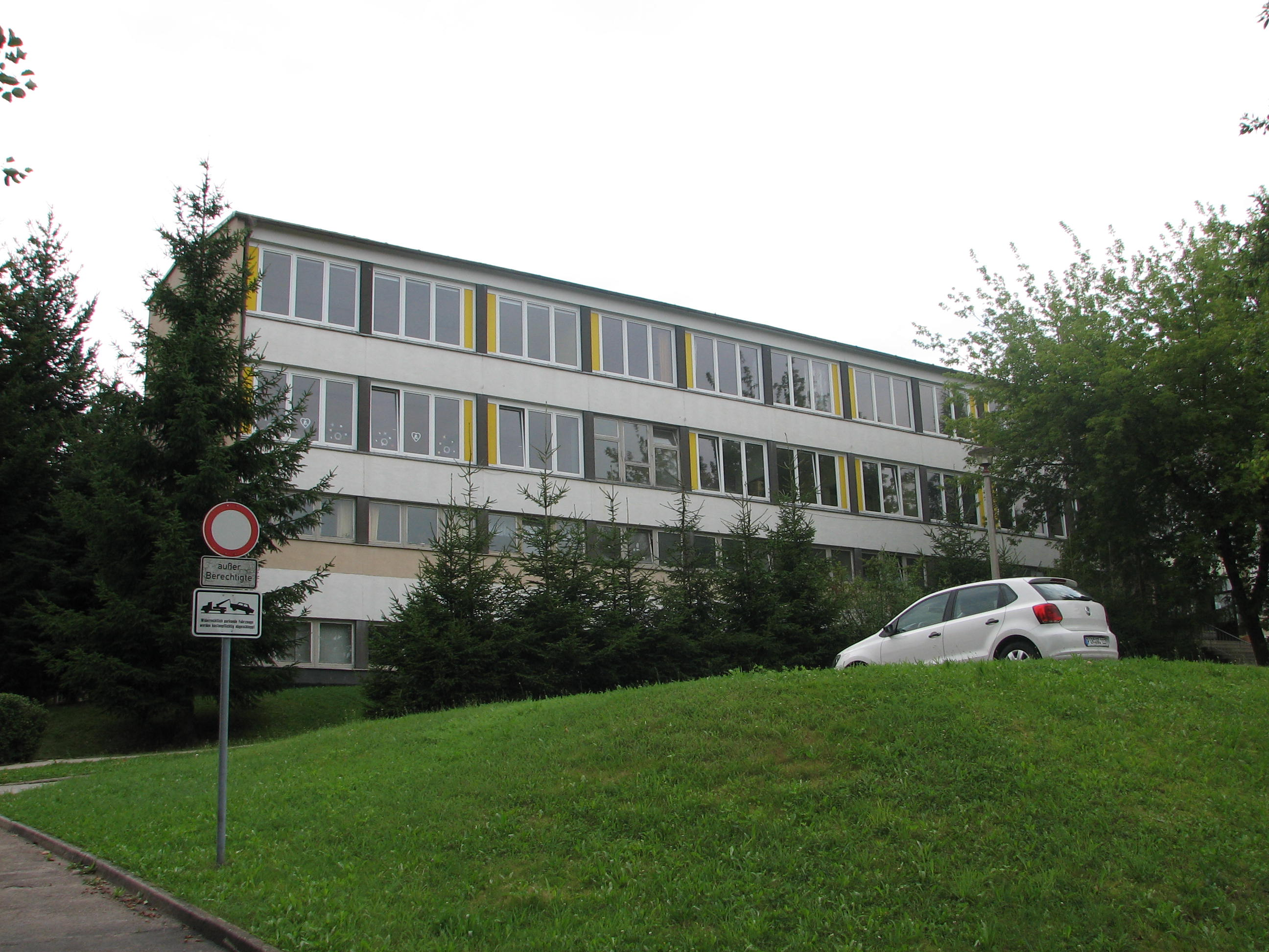 Dem Dorf zugewandte Seite der Wurgwitzer Schule. Links die Einfahrt zum Schulgelände.